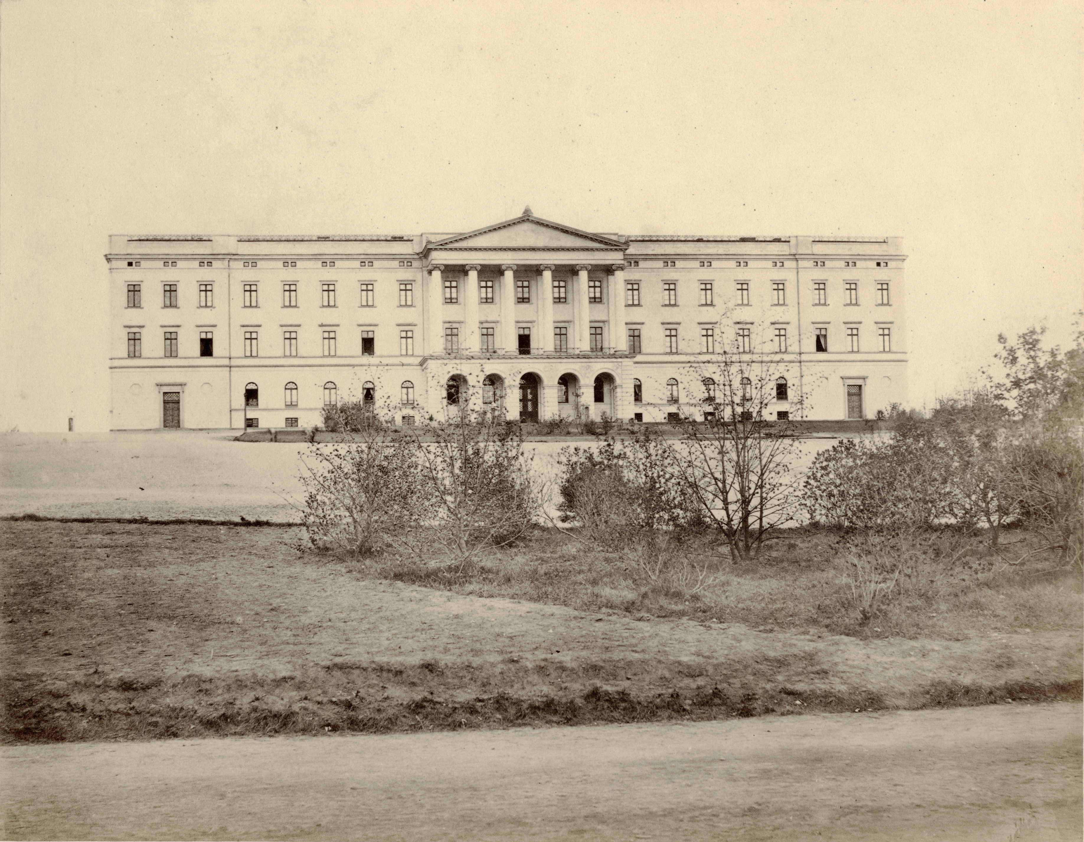 Det kgl.slott, Slottet i Oslo, Oslo